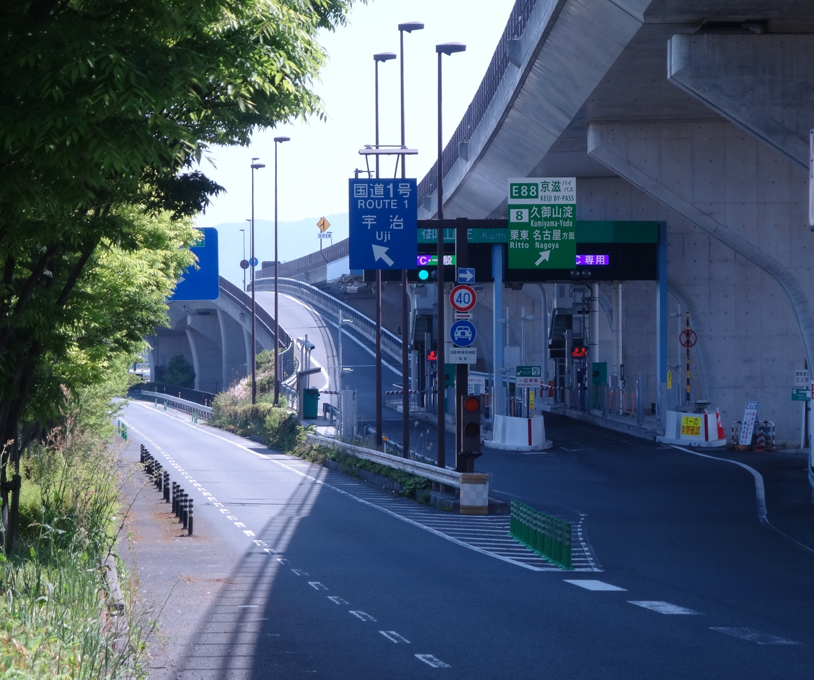 久御山淀インターチェンジ 栗東・名古屋方面料金所